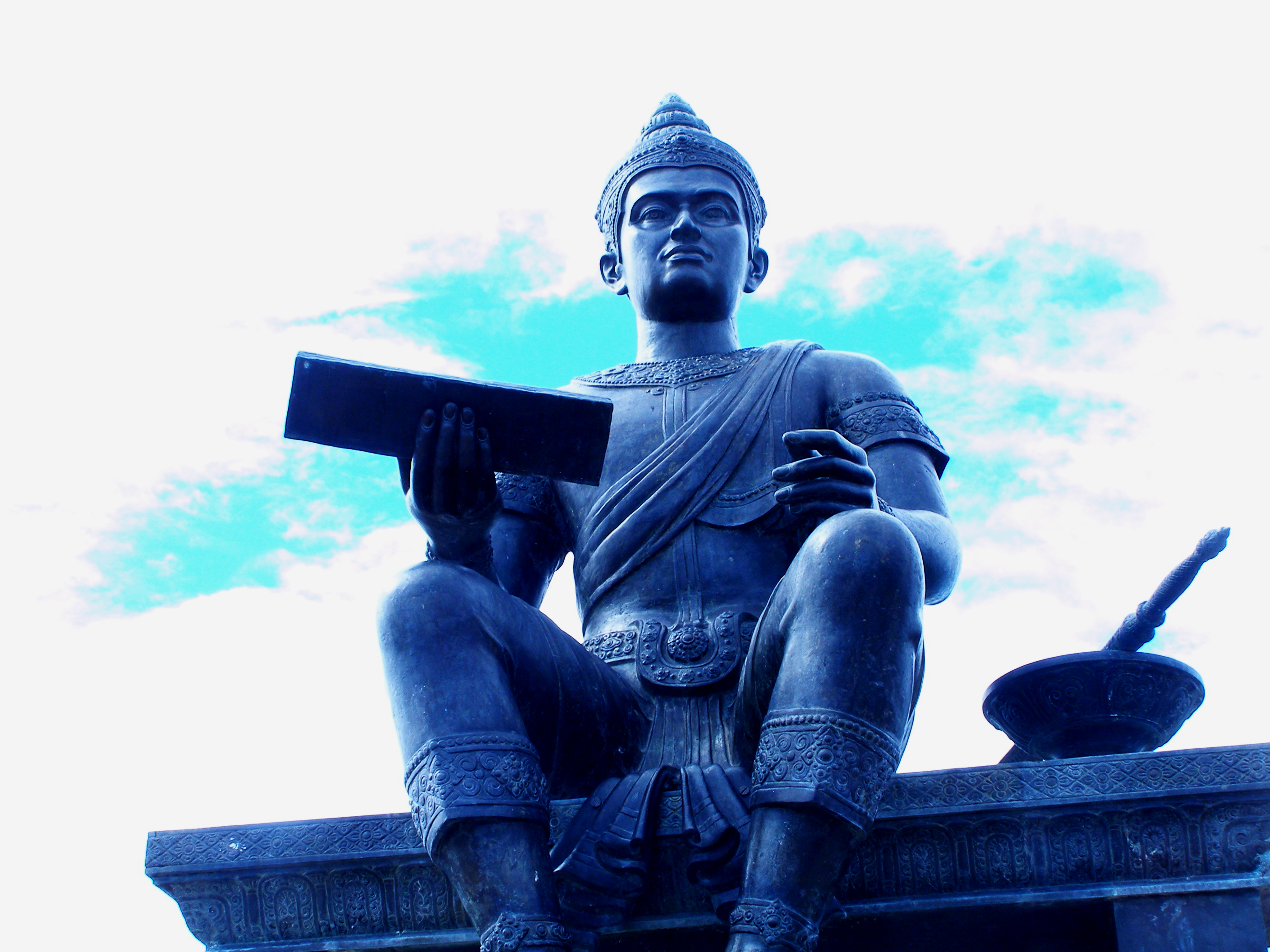 Ramkhamheng in Sukhothai.